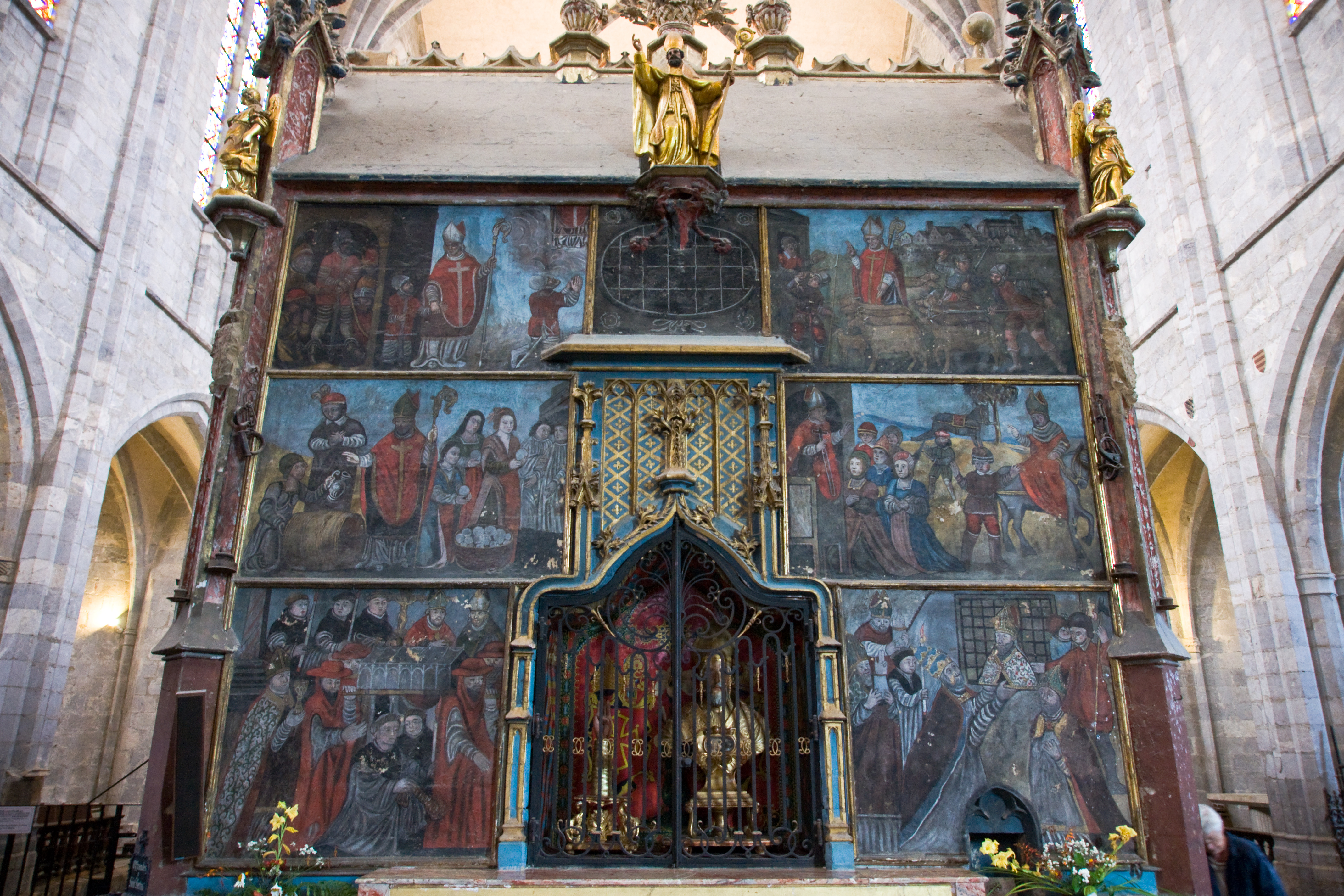 Tombeau de Saint Bertrand dans la cathédrale de saint Bertrand de Comminges